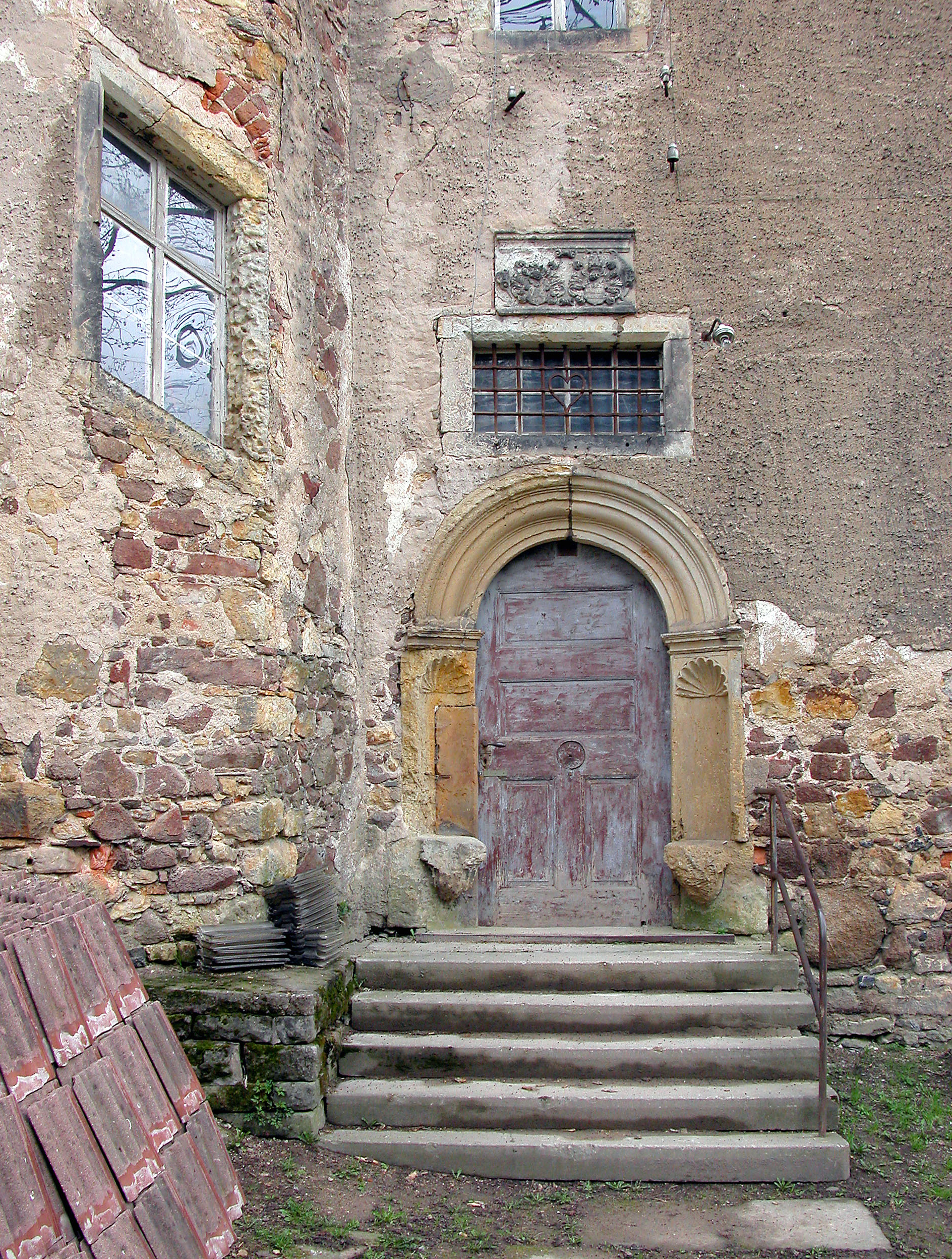 23.04.2006 01723 Limbach (zu Wilsdruff): Renaissanceschloß (Ende 16. Jh.). Sicht von Süden. [DSCN9594.TIF]20060423045DR.JPG(c)Blobelt